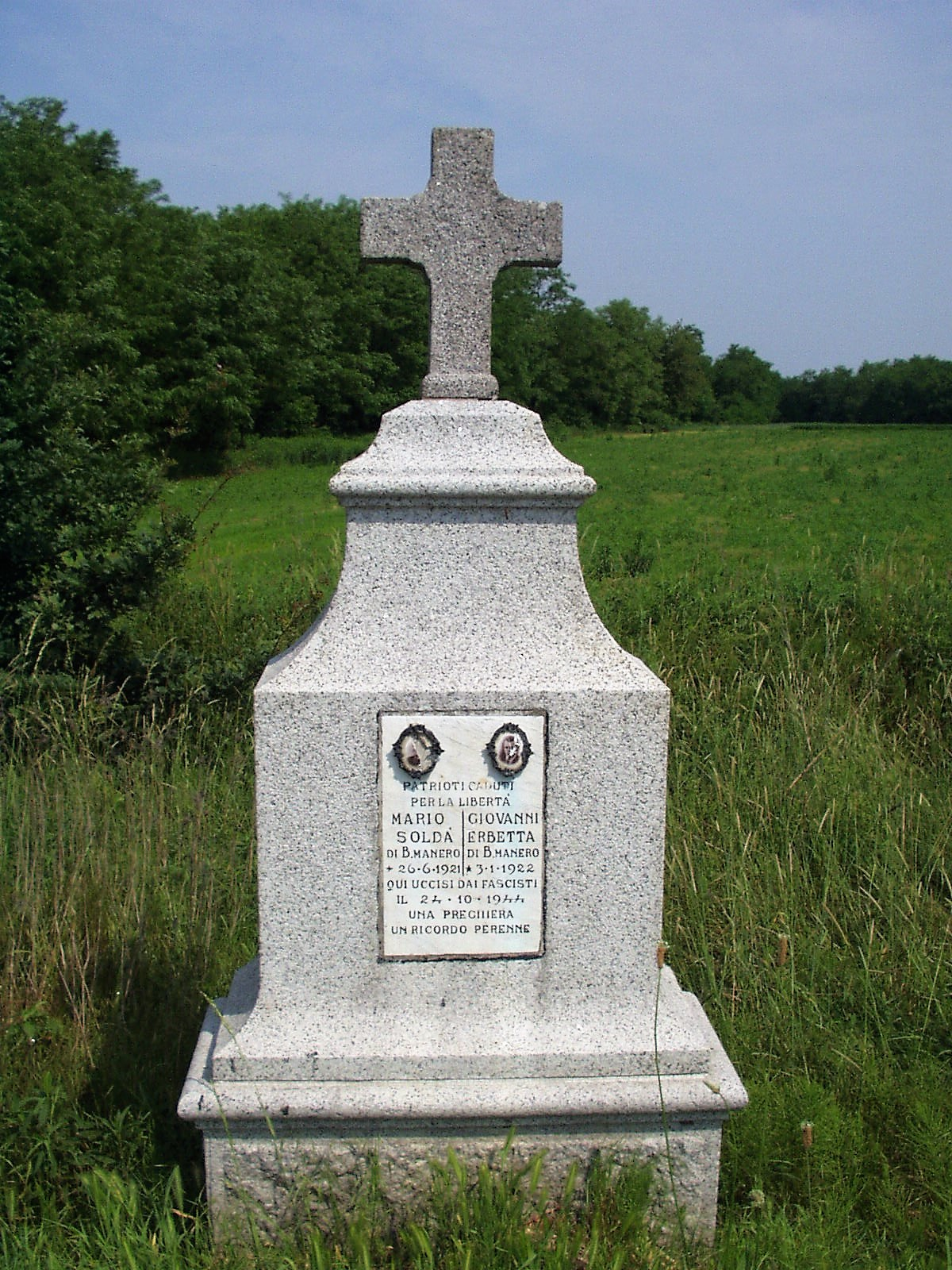 cippo dedicato ai due partigiani uccisi con le loro foto (rovinate), la loro data di nascita e la data di morte